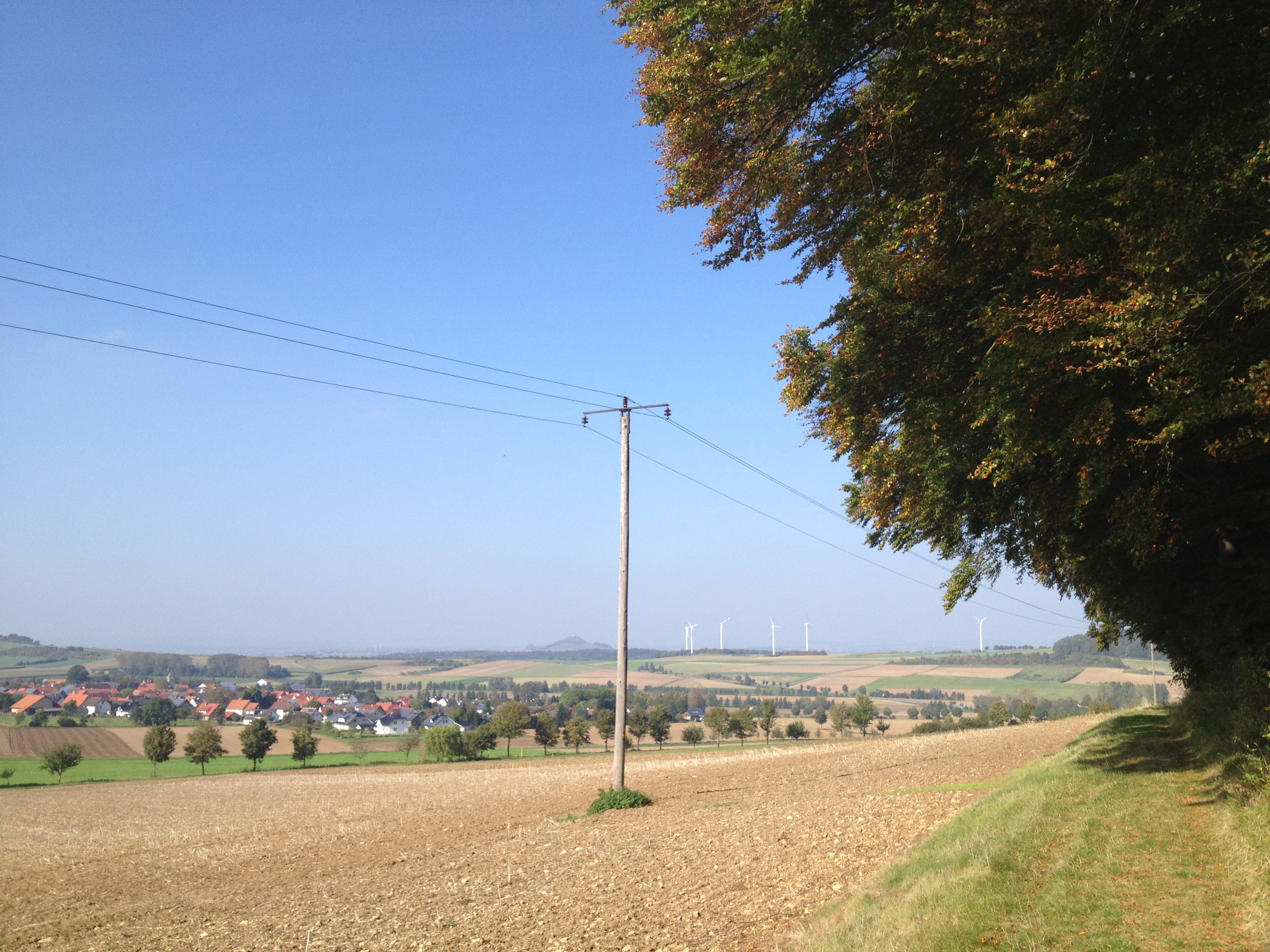 Der Fulda-Diemel-Weg (F), der Märchenlandweg (M) und die Extratour H1 des Habichtswaldsteiges zwischen Gut Sieberhausen, bzw. der Kreisstraße 86 und Niederlistingen, bzw. der Grillhütte Oberlistingen am Waldrand des Waldgebietes Igelsbett mit Blick auf Oberlistingen (links im Bild)